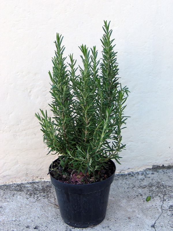 plant de romarin rosemary plant